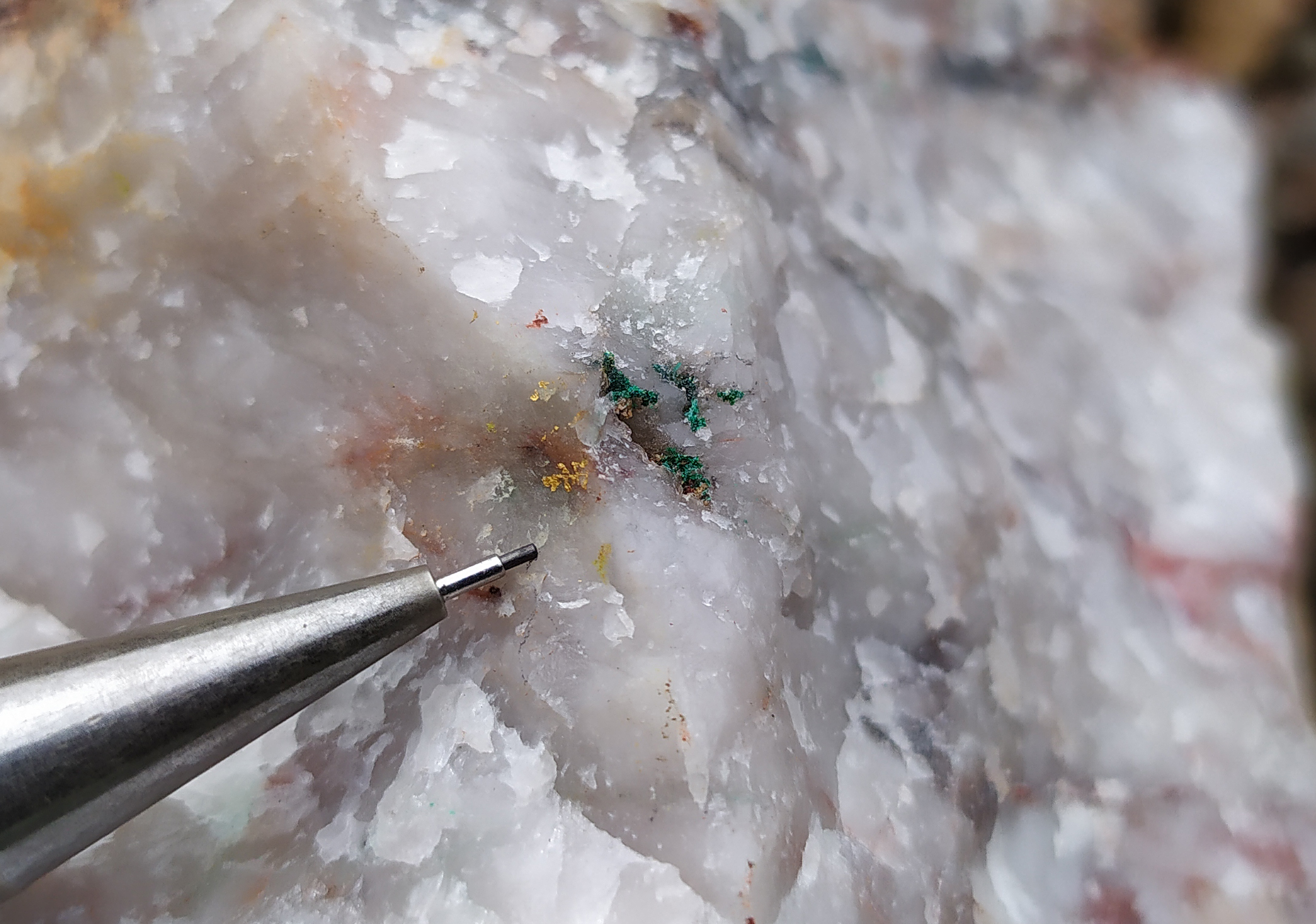 Oro libre y malaquita en venas de cuarzo. Valentines-Uruguay.